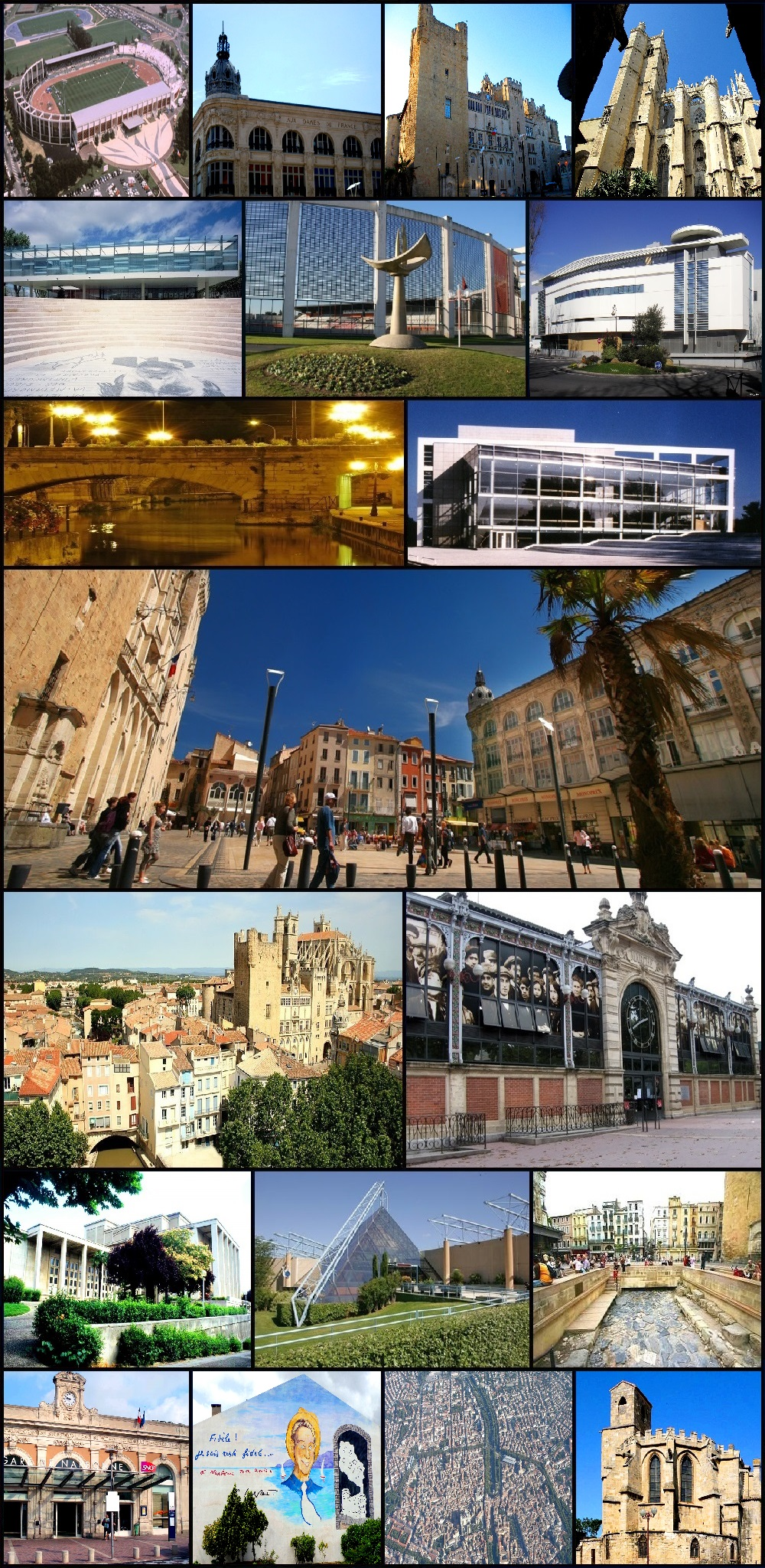 Montage photo de la ville de Narbonne (Aude)